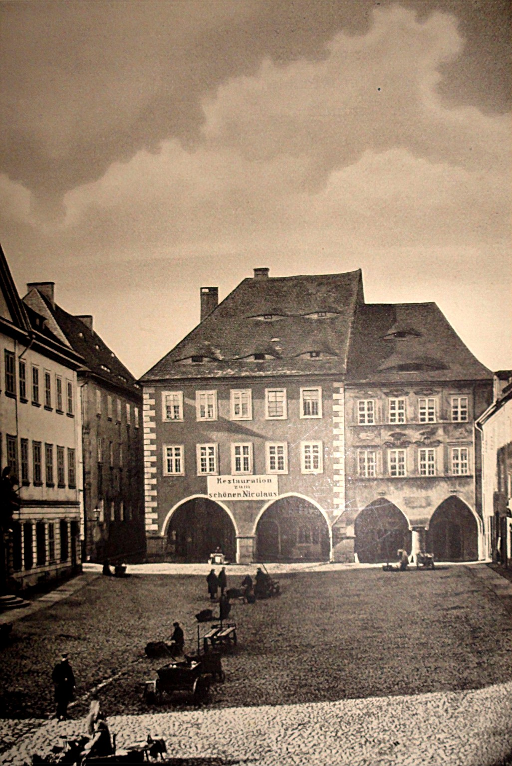 Untermarkt in Görlitz, Pilzläuben, heutiger Standort des Neuen Rathauses